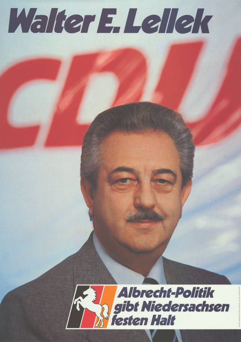 Walter E. Lellek CDU Albrecht-Politik gibt Niedersachsen festen Halt Abbildung: Porträtfoto - Nationalfarben mit Niedersachsenross Plakatart: Kandidaten-/Personenplakat mit Porträt Auftraggeber: Verantw.: Niedersachsen-CDU, Hannover Drucker_Druckart_Druckort: Willy F.P. Fehling GmbH, Hannover Objekt-Signatur: 10-008 : 488 Bestand: Landtagswahlplakate Niedersachsen (10-008) GliederungBestand10-18: Landtagswahlplakate Niedersachsen (10-008) » CDU Lizenz: KAS/ACDP 10-008 : 488 CC-BY-SA 3.0 DE